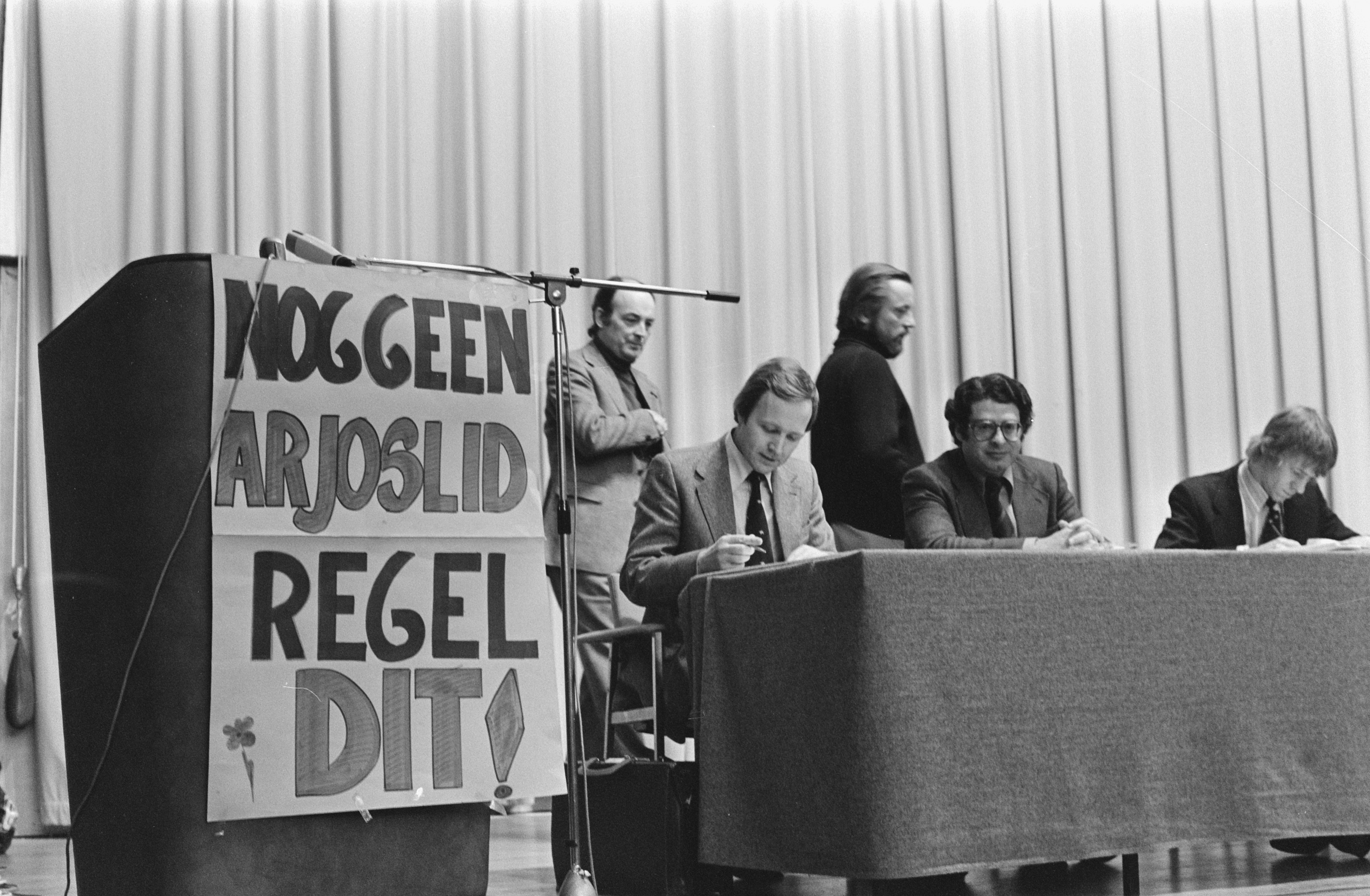 Collectie / Archief : Fotocollectie Anefo Reportage / Serie : [ onbekend ] Beschrijving : Congres Arjos (AR Jongeren) Den Haag Datum : 20 maart 1976 Locatie : Den Haag, Zuid-Holland Trefwoorden : congressen Persoonsnaam : Congres Arjos Instellingsnaam : AR Fotograaf : Mieremet, Rob / Anefo Auteursrechthebbende : Nationaal Archief Materiaalsoort : Negatief (zwart/wit) Nummer archiefinventaris : bekijk toegang 2.24.01.05 Bestanddeelnummer : 934-6604